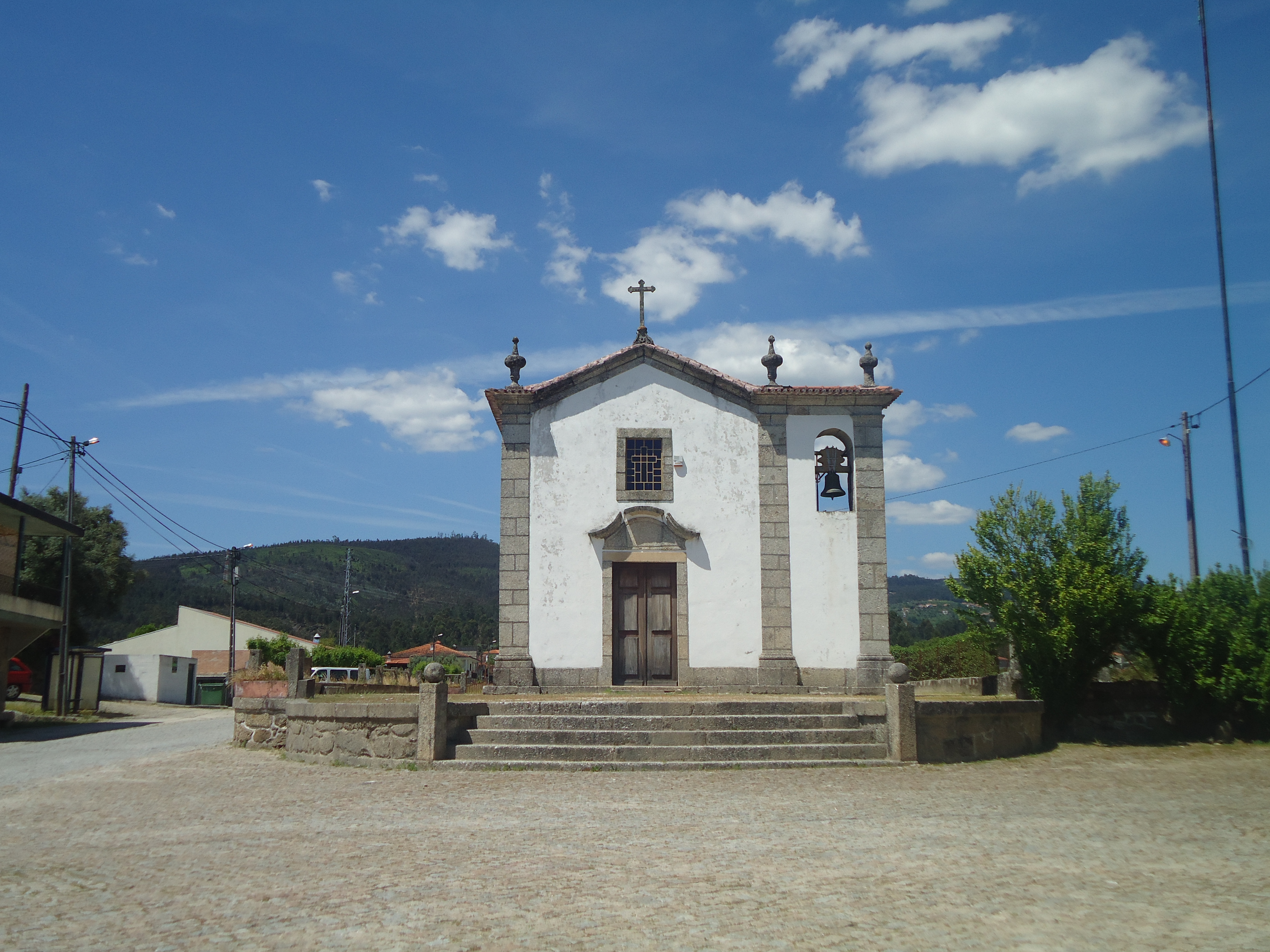 Amarante Igreja Matriz de Aboim